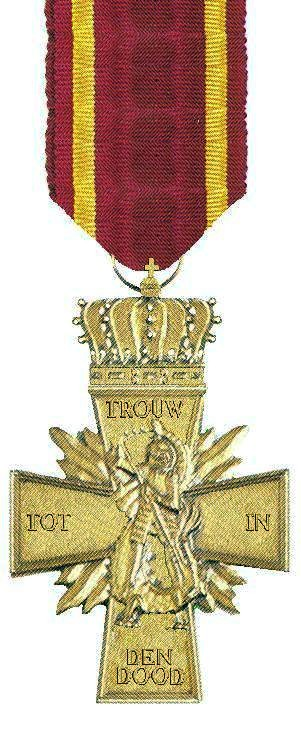 Eigen tekening